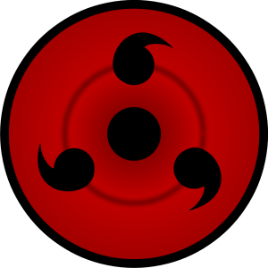 Bentuk mata Sharingan 3 roda